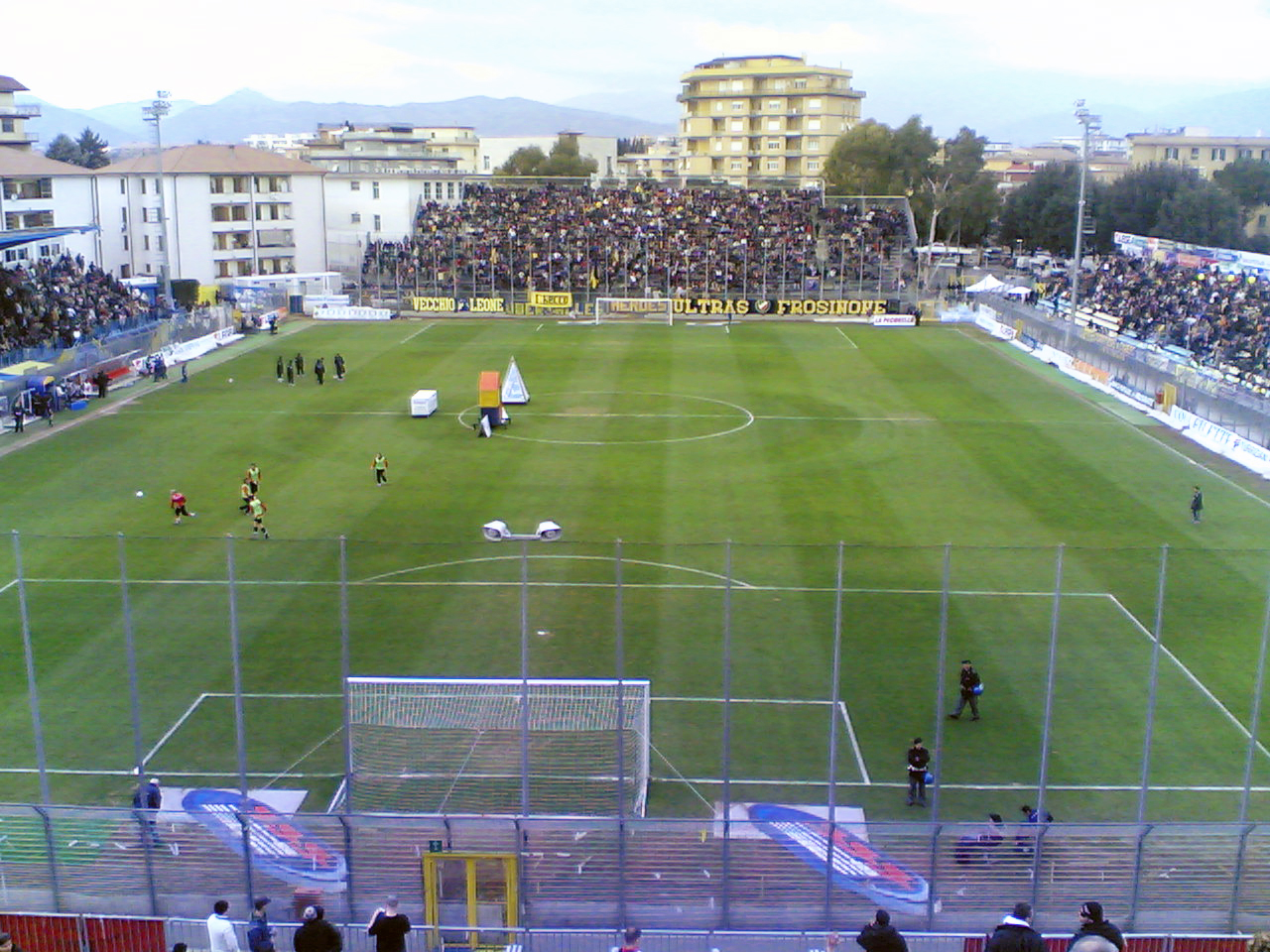 Lo stadio Matusa di Frosinone nel febbraio 2007.